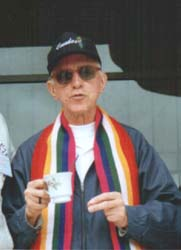 Dom Pedro Casaldaliga